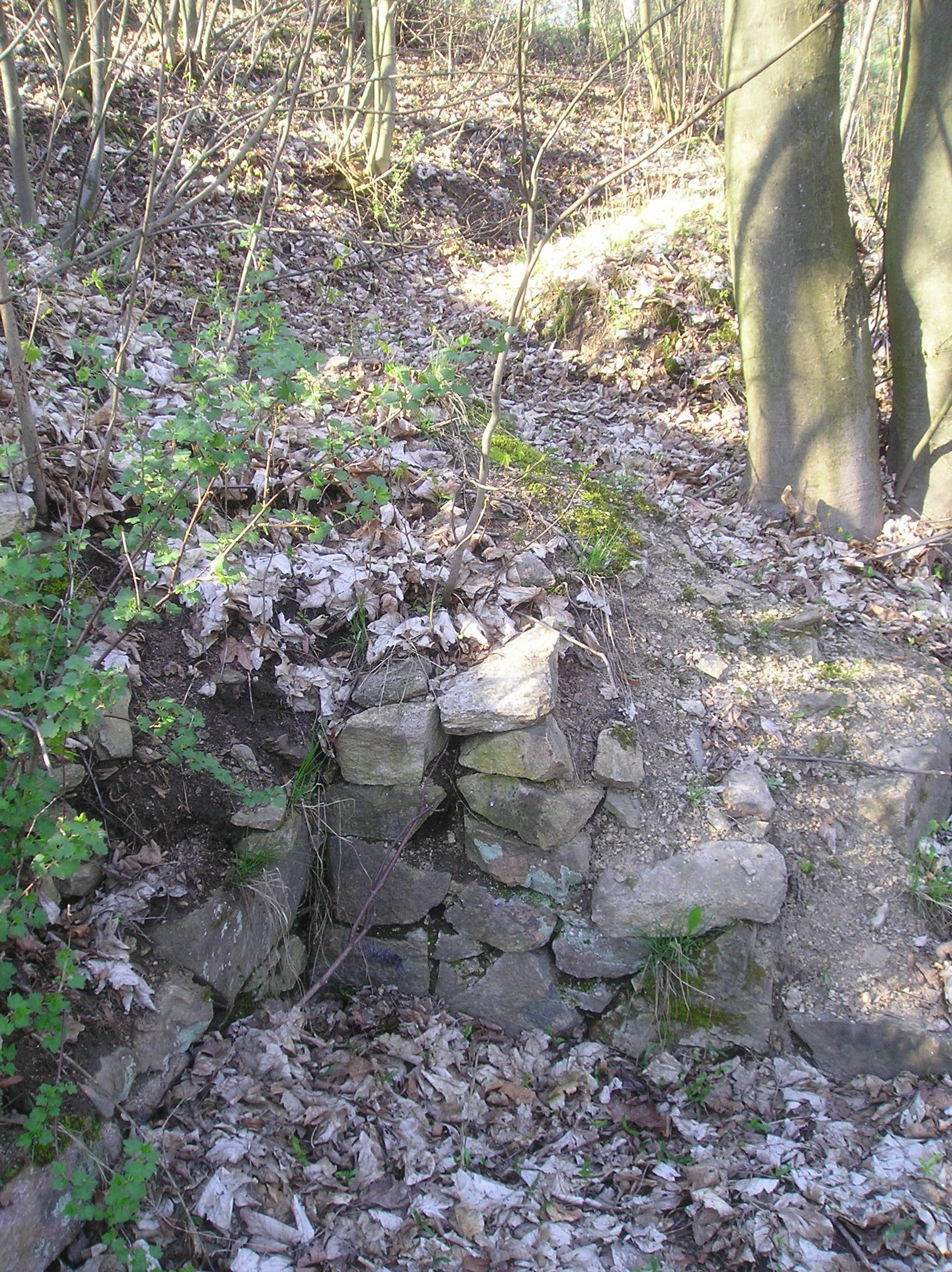 Amatérsky vykopané zbytky zdiva na Mostišti.